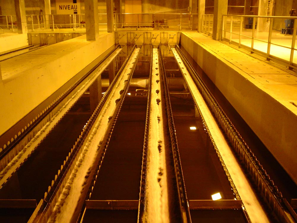 Traitement par floculation-décantation (Amphitria, station d'épuration du Var, France)